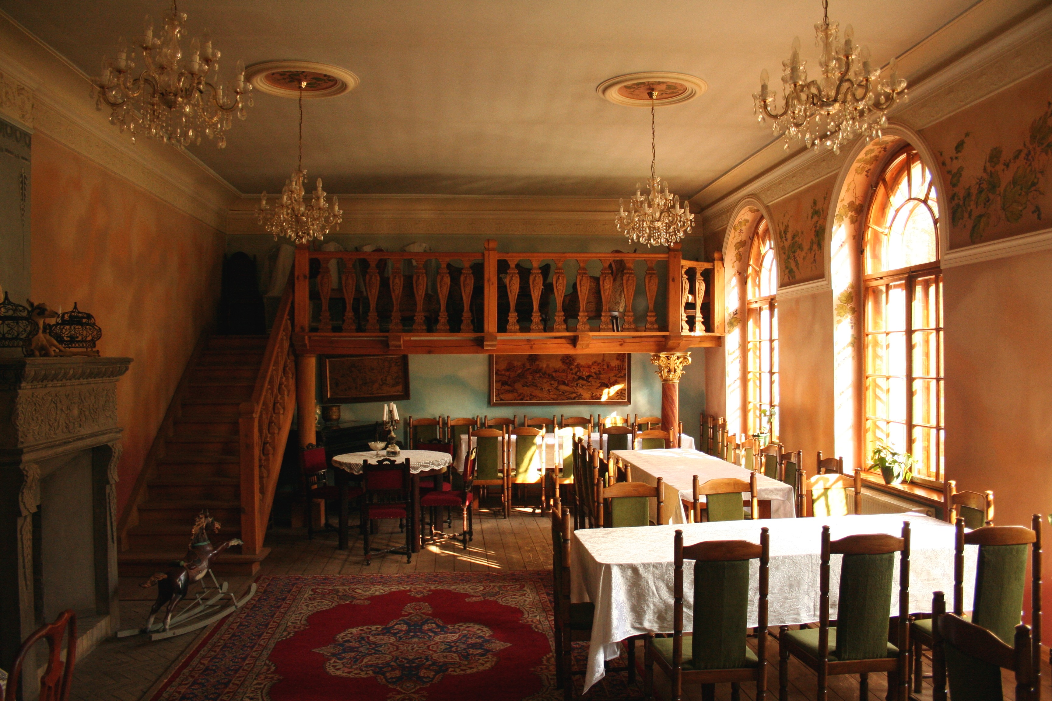 Antresola w restauracji Za miastem, Piasek, powiat lubliniecki